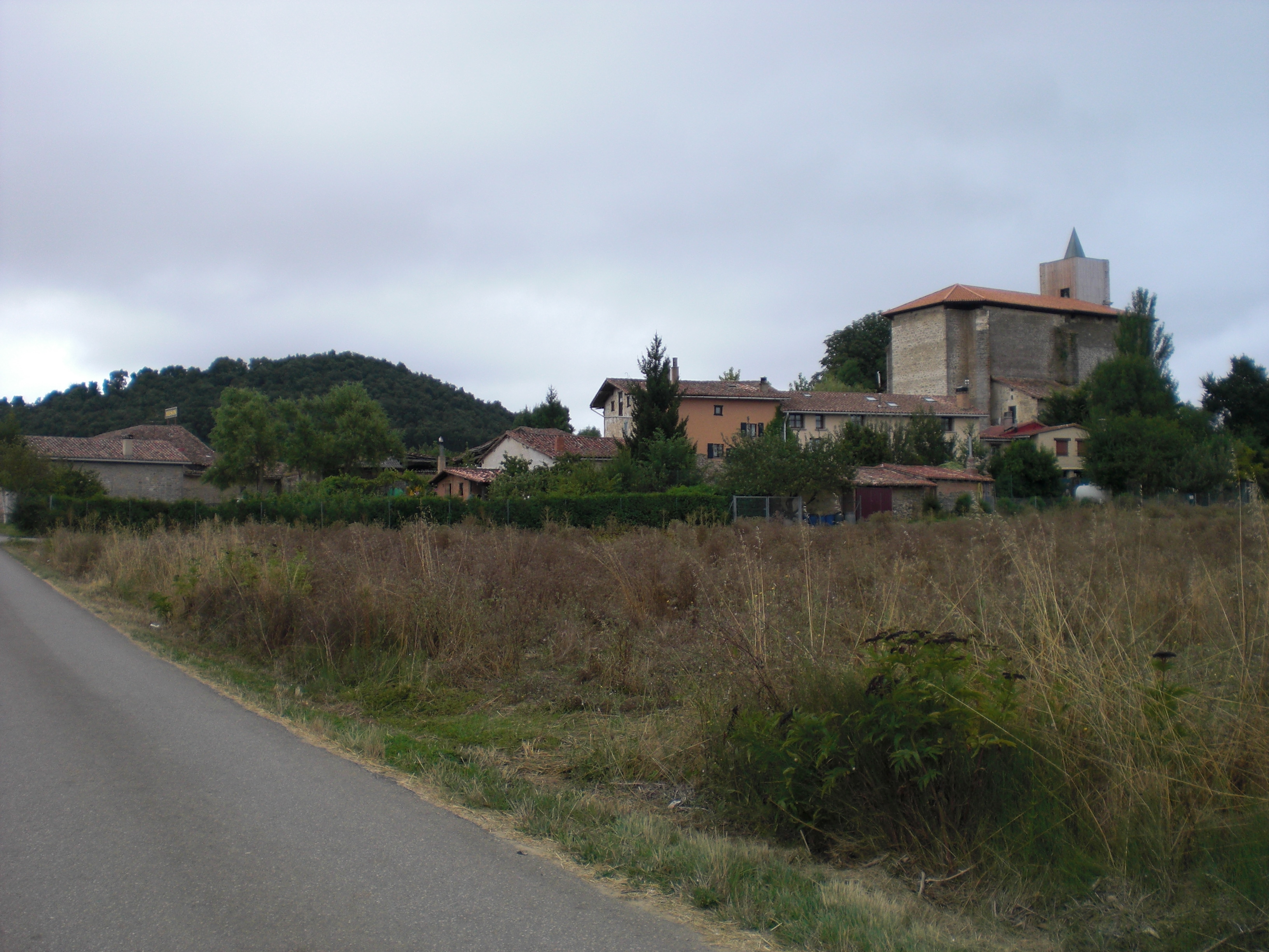 Otazuko ikuspegia